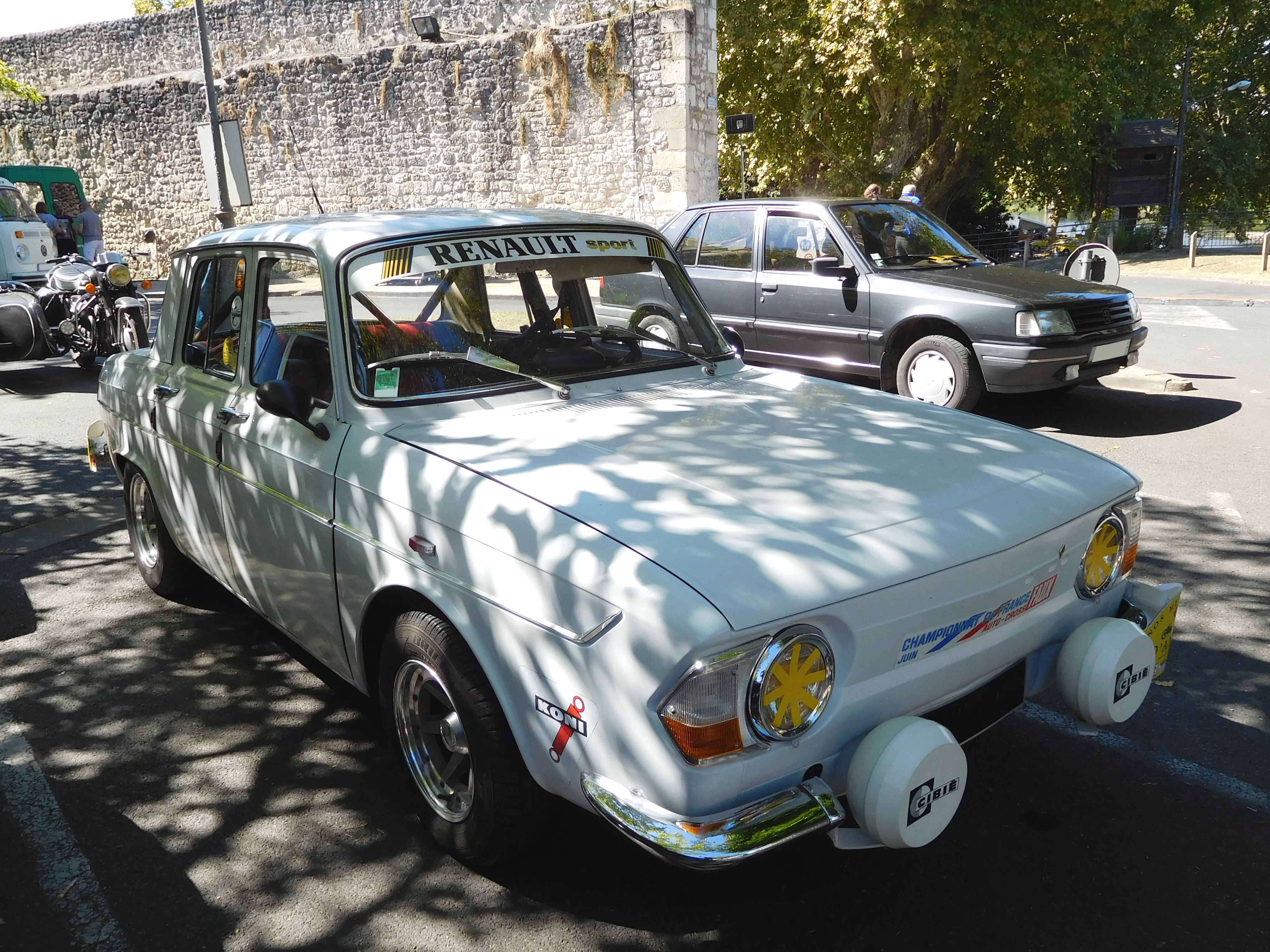 Renault 8 Gordini du club Nos Mécaniques d'antan.